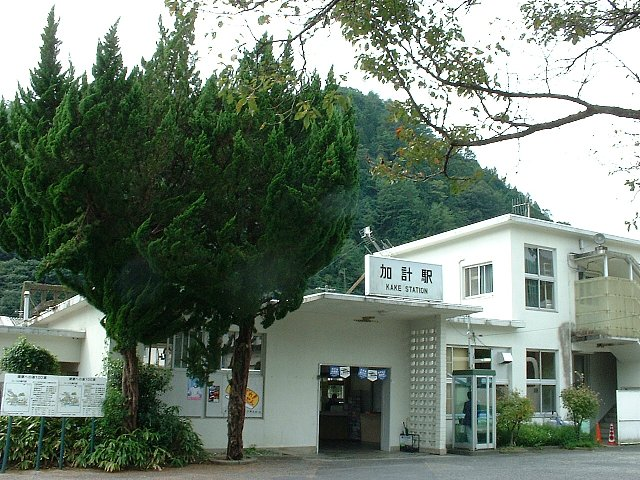 可部線加計駅舎（現在廃駅）